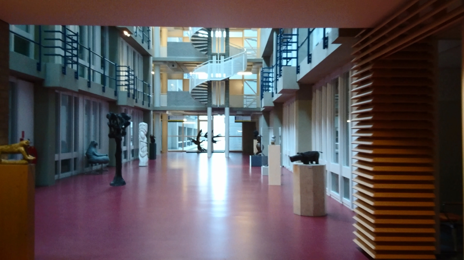 Фотография помещения в Лейденском Госпитале, где сидит и ждет Ждун